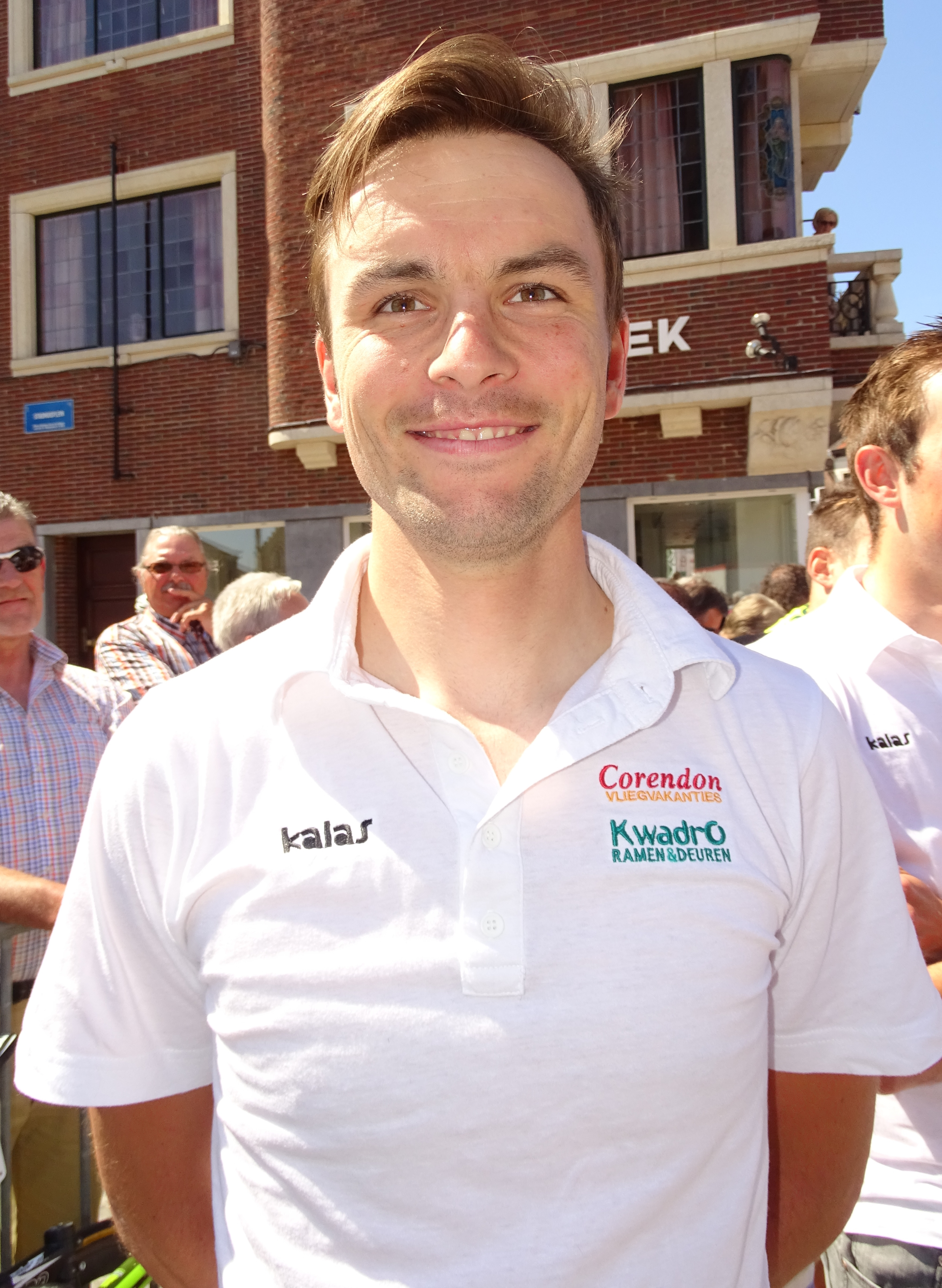 Reportage réalisé le dimanche 14 juin à l'occasion du départ et de l'arrivée du Tour du Limbourg 2015 à Tongres, Belgique.